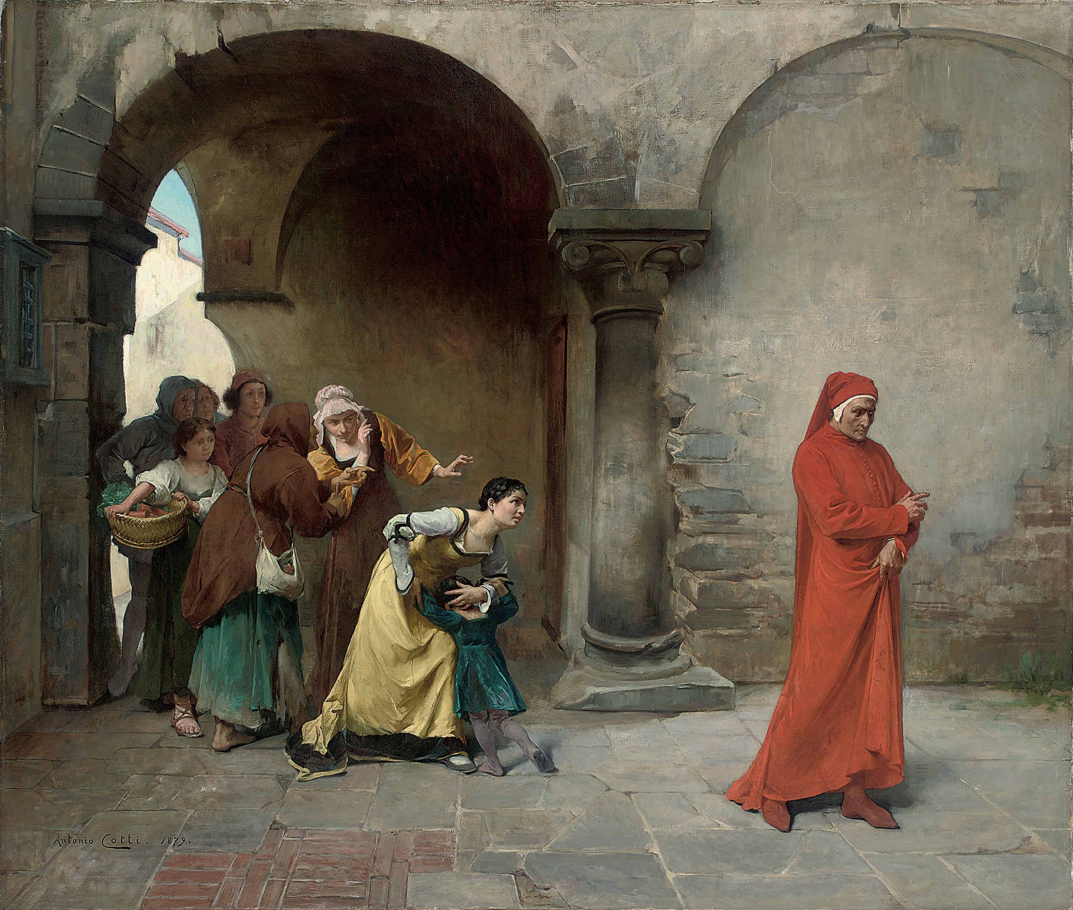 Forse il titolo è "Dante deriso a Verona"; vedi [1] e [2]